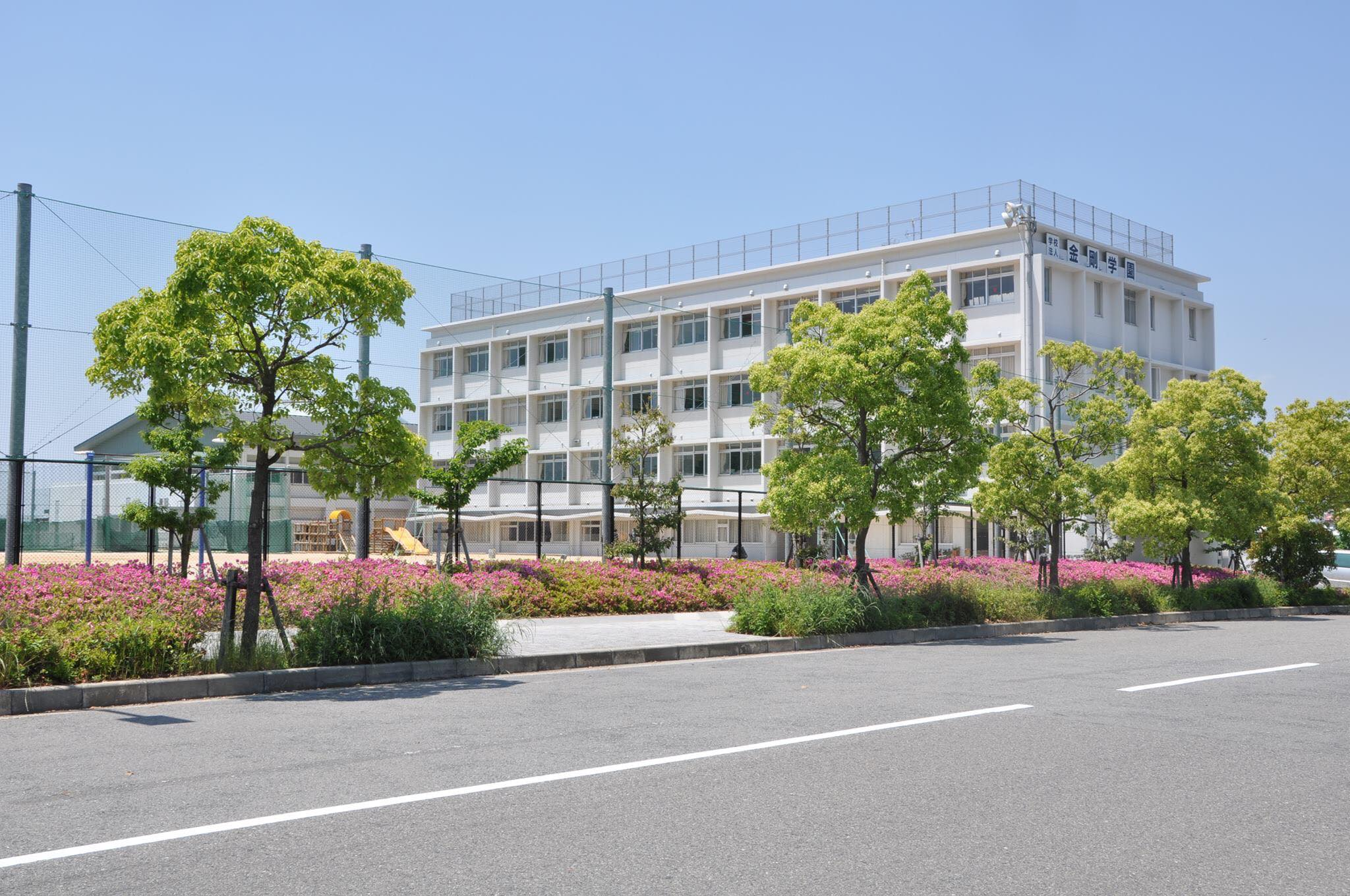 金剛学園の写真